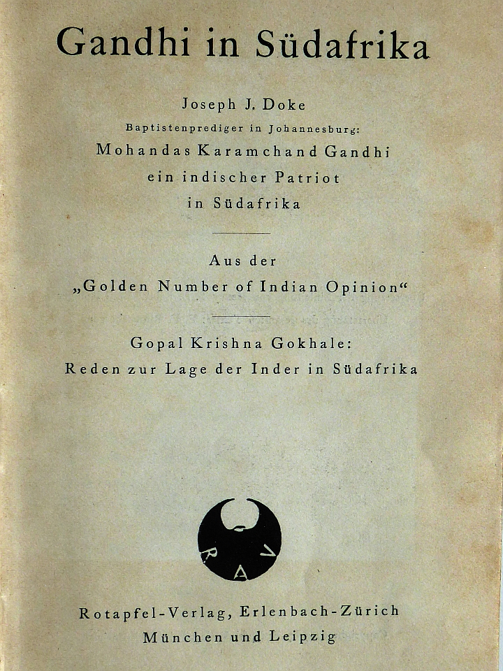 Buch:Gandhi in Südafrika-Mohandas Karemchand Gandhi ein indischer Patriot in Südafrika, Verfasser: Joseph J. Doke, Baptistenprediger in Johannesburg. Erschienen 1925 im Rotapfel Verlag, Erlenbach, Zürich, Schweiz